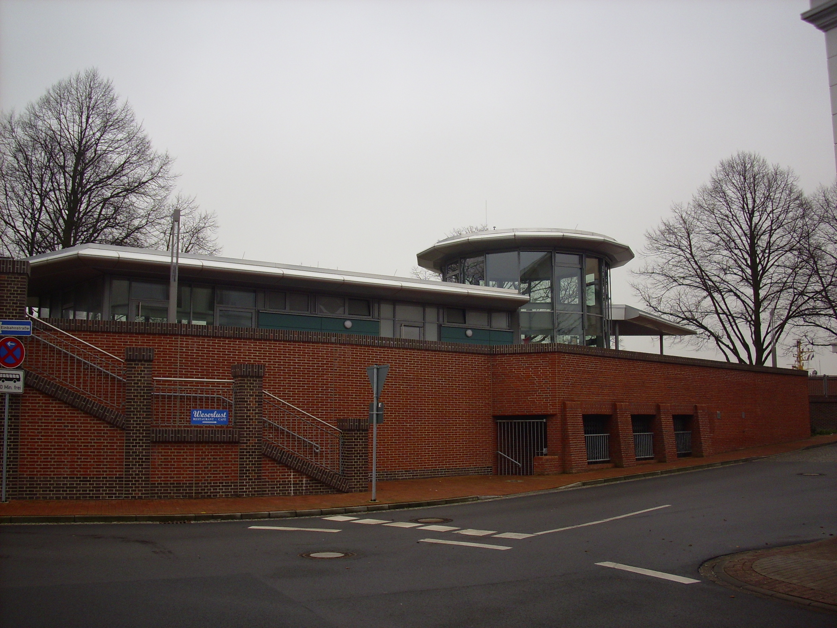 Die Stadtinformation an der Kaje in Brake (Unterweser)